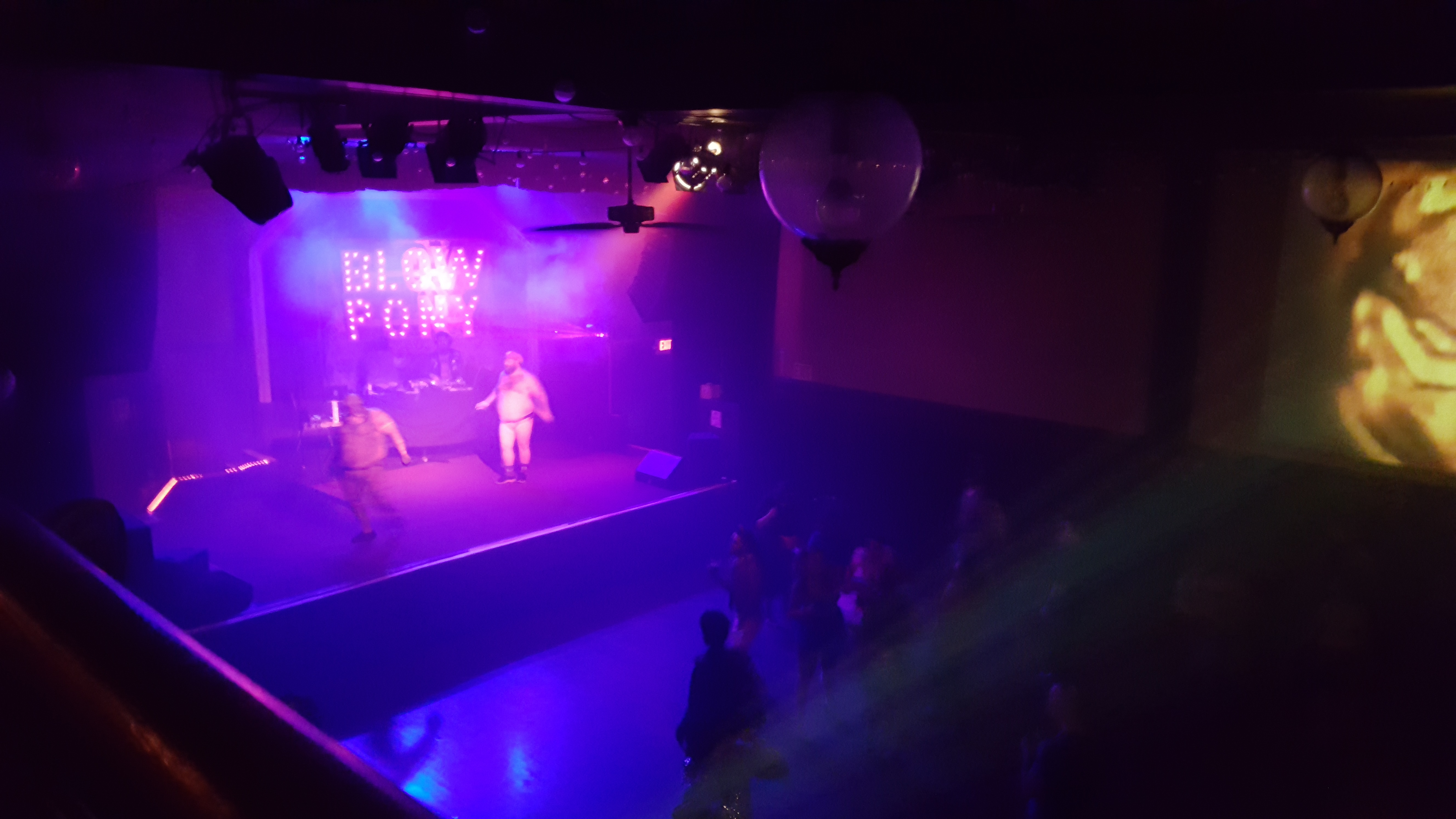 Blow Pony